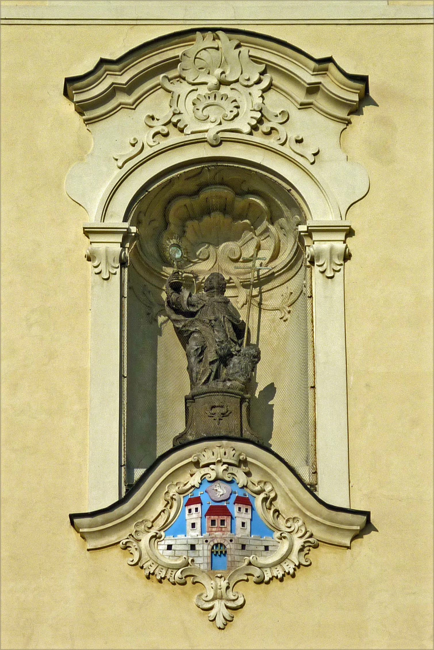 Statue des Hl. Norbert von Xanten am Glockenturm der Stadtpfarrkirche in Saaz/Žatec, erkennbar an seinem Attribut, einer Monstranz, und das Stadtwappen von Saaz/Žatec